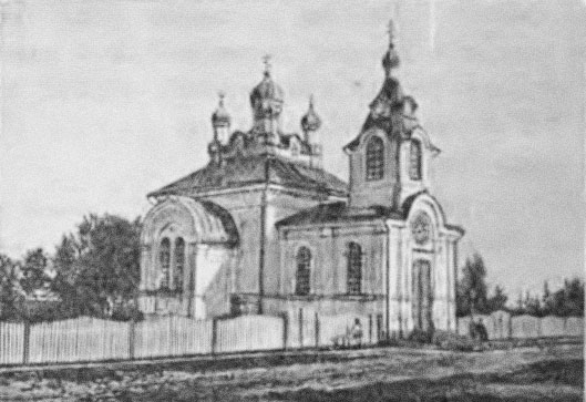 Беларуская (тарашкевіца): Вялейка (Vialejka), пляц Рынак (plac Rynak). Царква-мураўёўка